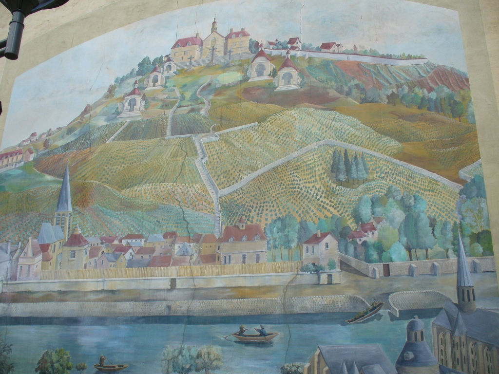 Peinture sur un mur de Suresnes, représentant le Mont-Valérien à l'époque des religieux.